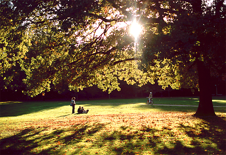 Luisenpark, Mannheim, Germany